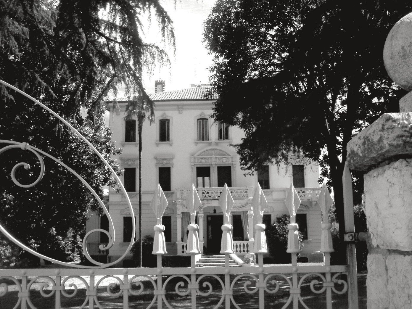 Colle Umberto (Treviso, Italia): Villa Feletti, elegante edificio padronale novecentesco.